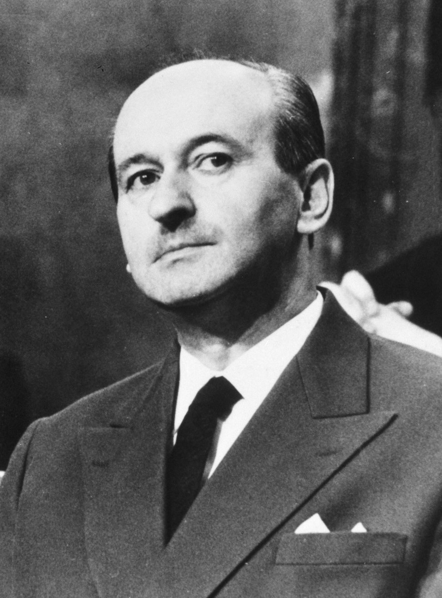 Oorlogsmisdadiger Jan Verbelen in de beklaagdenbank tijdens een proces tegen hem in Oostenrijk